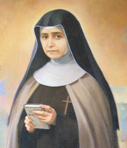 Блаженная Мария Тереза Иисуса (в миру Мария Скрилли), основательница Конгрегации Сестер Божией Матери Кармельской. Автор неизвестен.